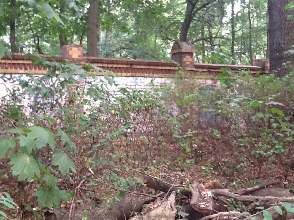 Wuhlgarten-Gelände, jetzt Unfallkrankenhaus Berlin: Friedhofsmauer